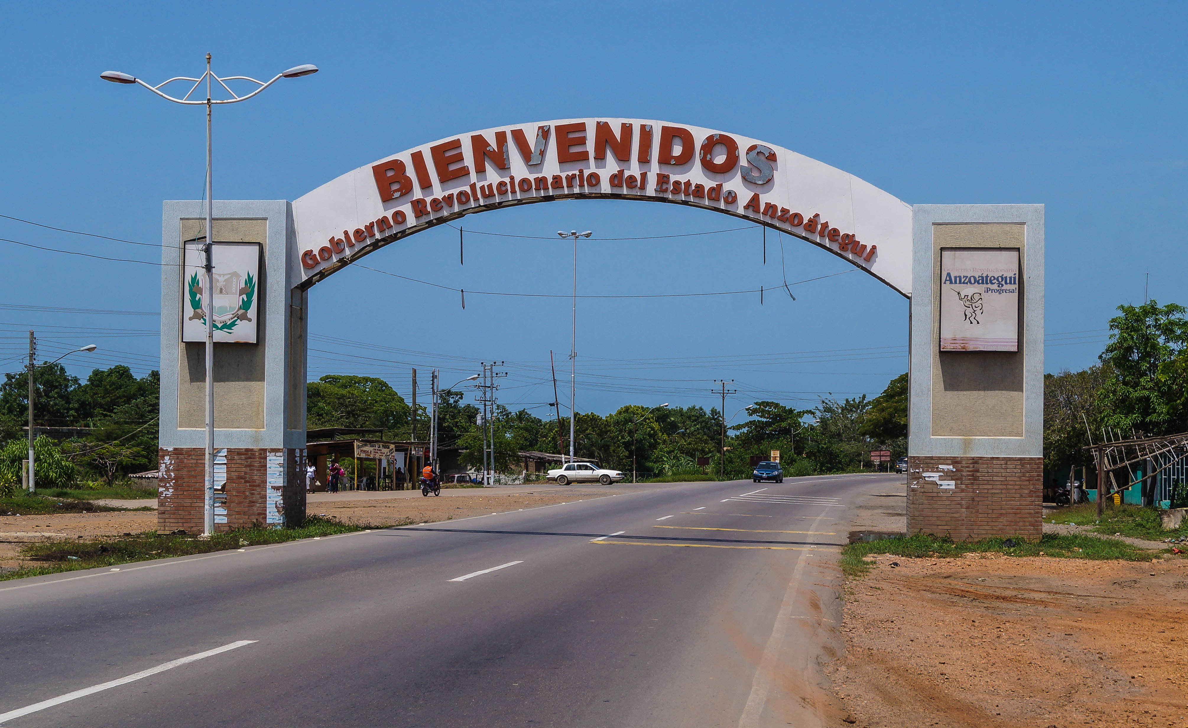 Entrada al estado Anzoategui. Venezuela